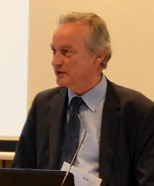 Vorsitzender Rolf Bärenfänger bei der Jahresversammlung 2014 der Archäologischen Kommission für Niedersachsen